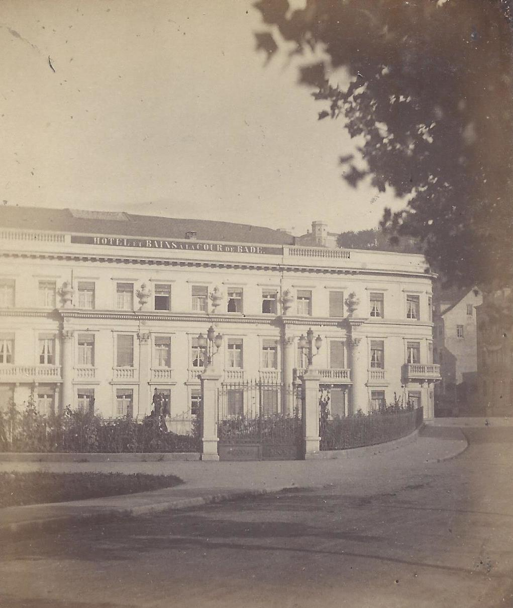 Numa Blanc: Hotel Cour de Bade in Baden-Baden, aufgewalzter Albuminabzug, 1863.